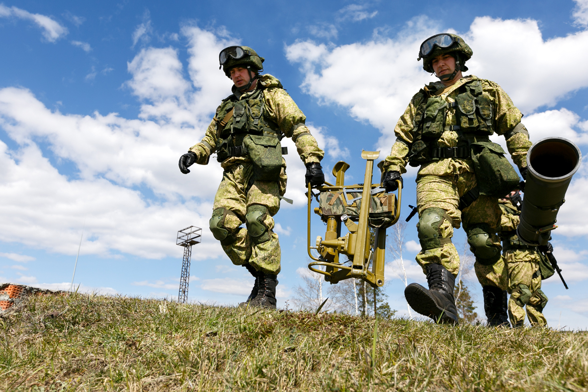 Контрольная проверка курсантов Учебного центра боевого применения ракетных войск и артиллерии Сухопутных войск Западного военного округа (Московская обл.)